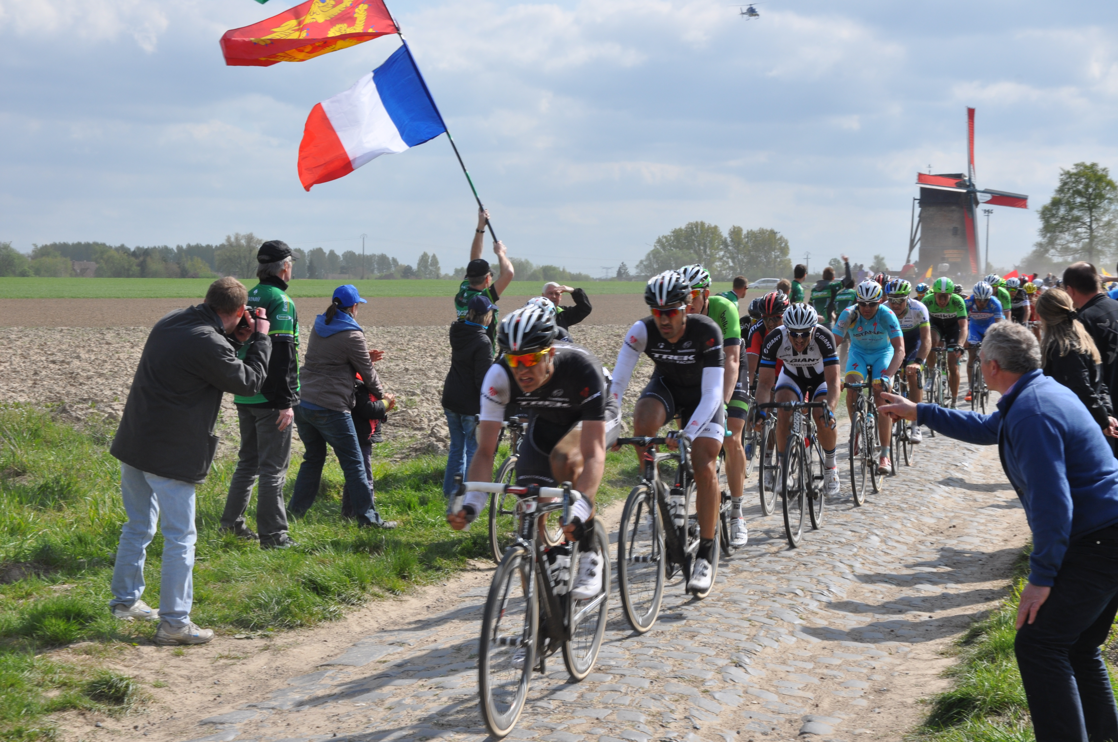 Paris Roubaix 2014, à Templeuve, peloton